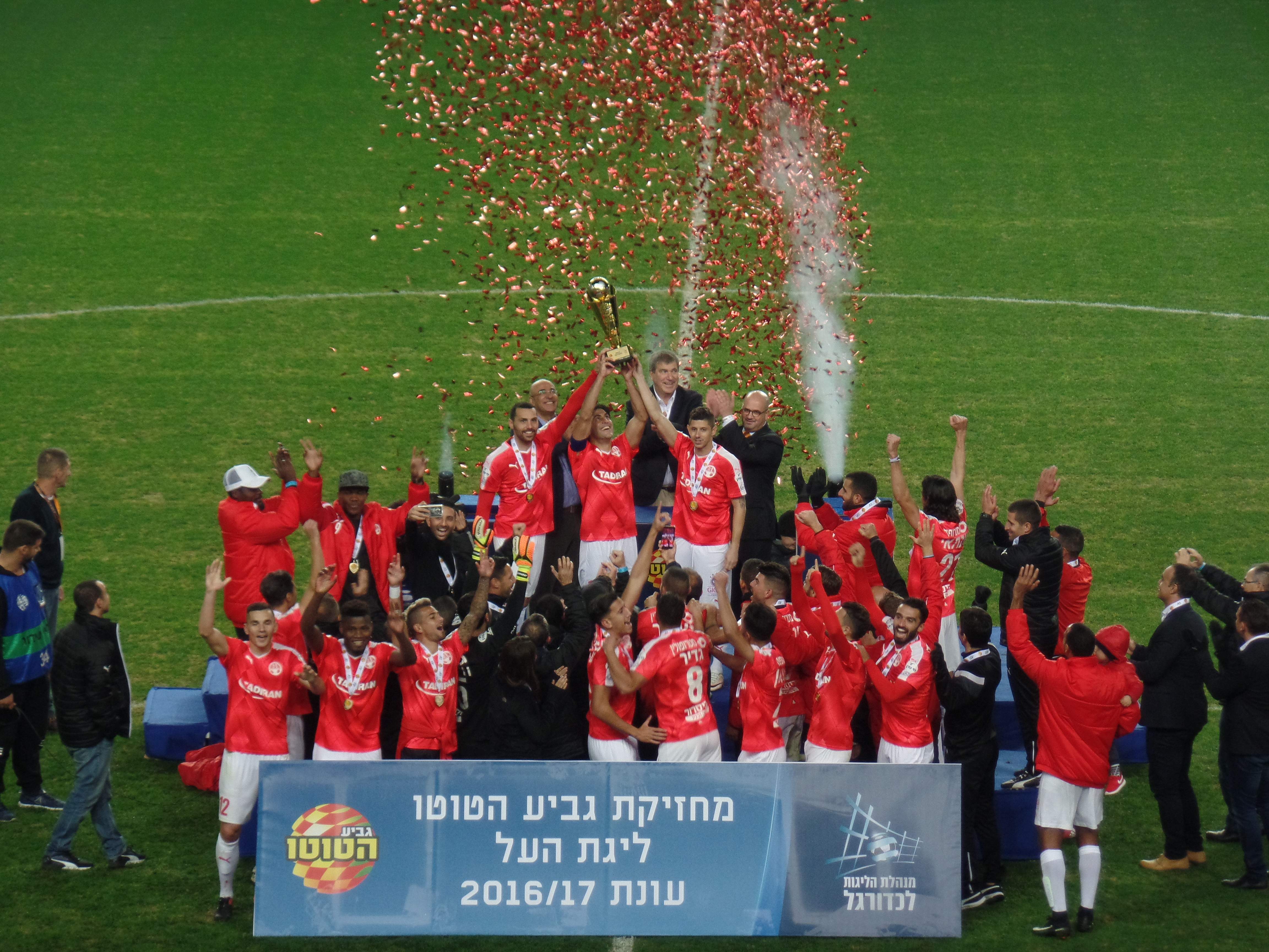 הפועל באר-שבע זוכה בגביע הטוטו